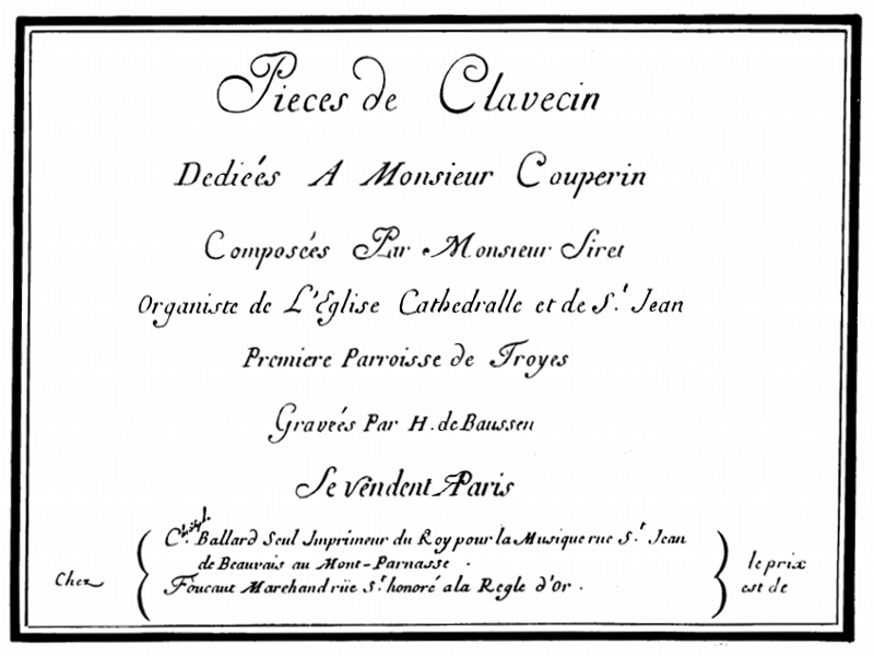 Page de titre du livre de 1709.